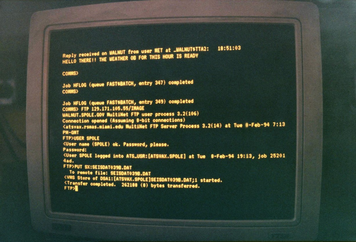 Bildschirmfoto der ersten FTP-Übertragung von der Amundsen-Scott Forschungsbasis am Südpol